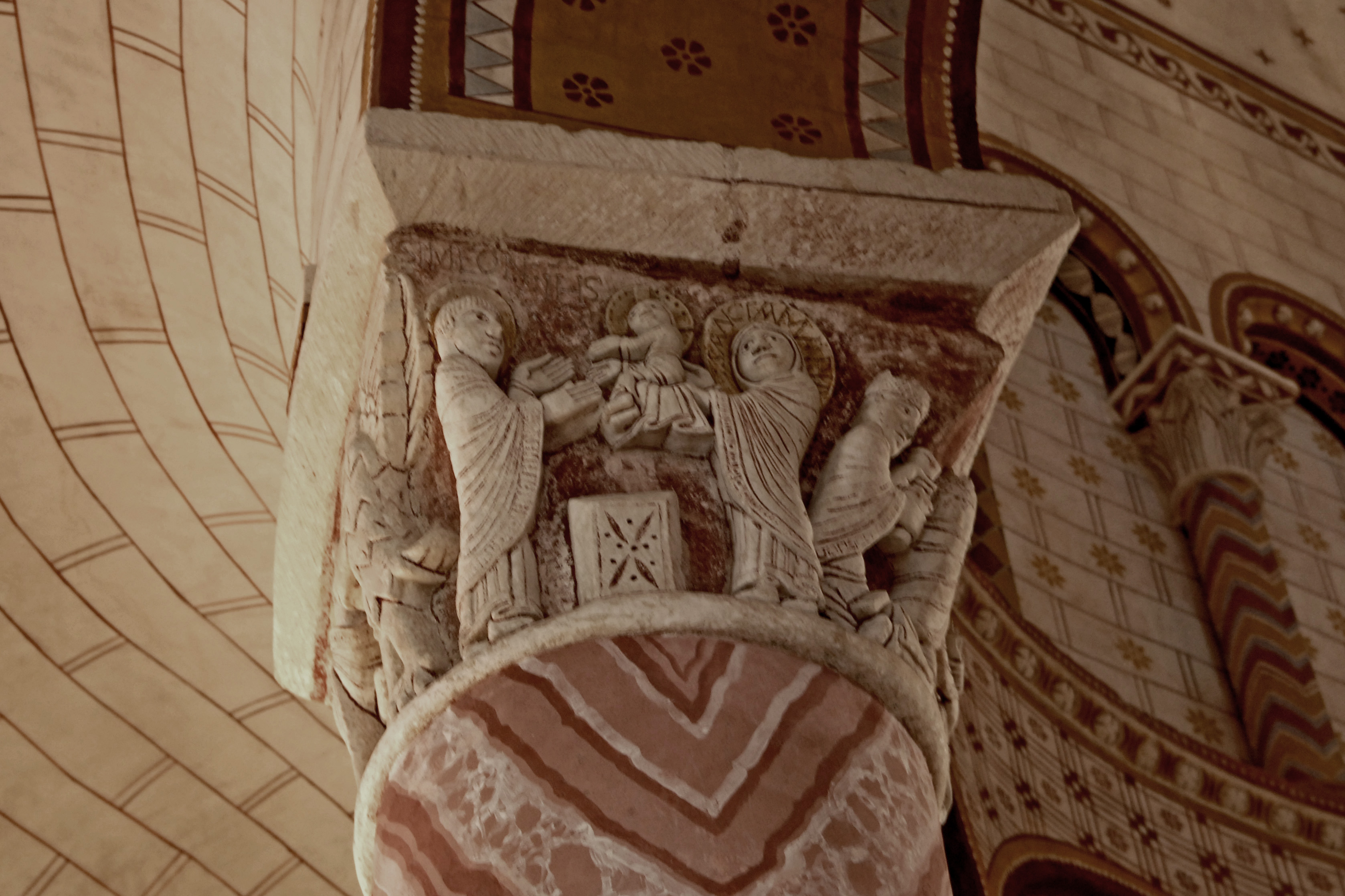 Kapitell IV